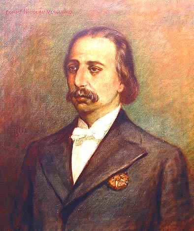 O proprietário rural e político brasileiro Nicolau José de Campos Vergueiro.